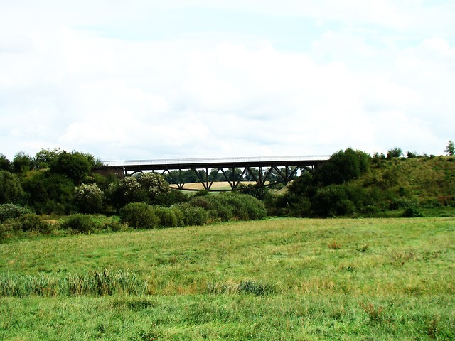 Most w Marcinkowie. Zdjęcie od Zachodu